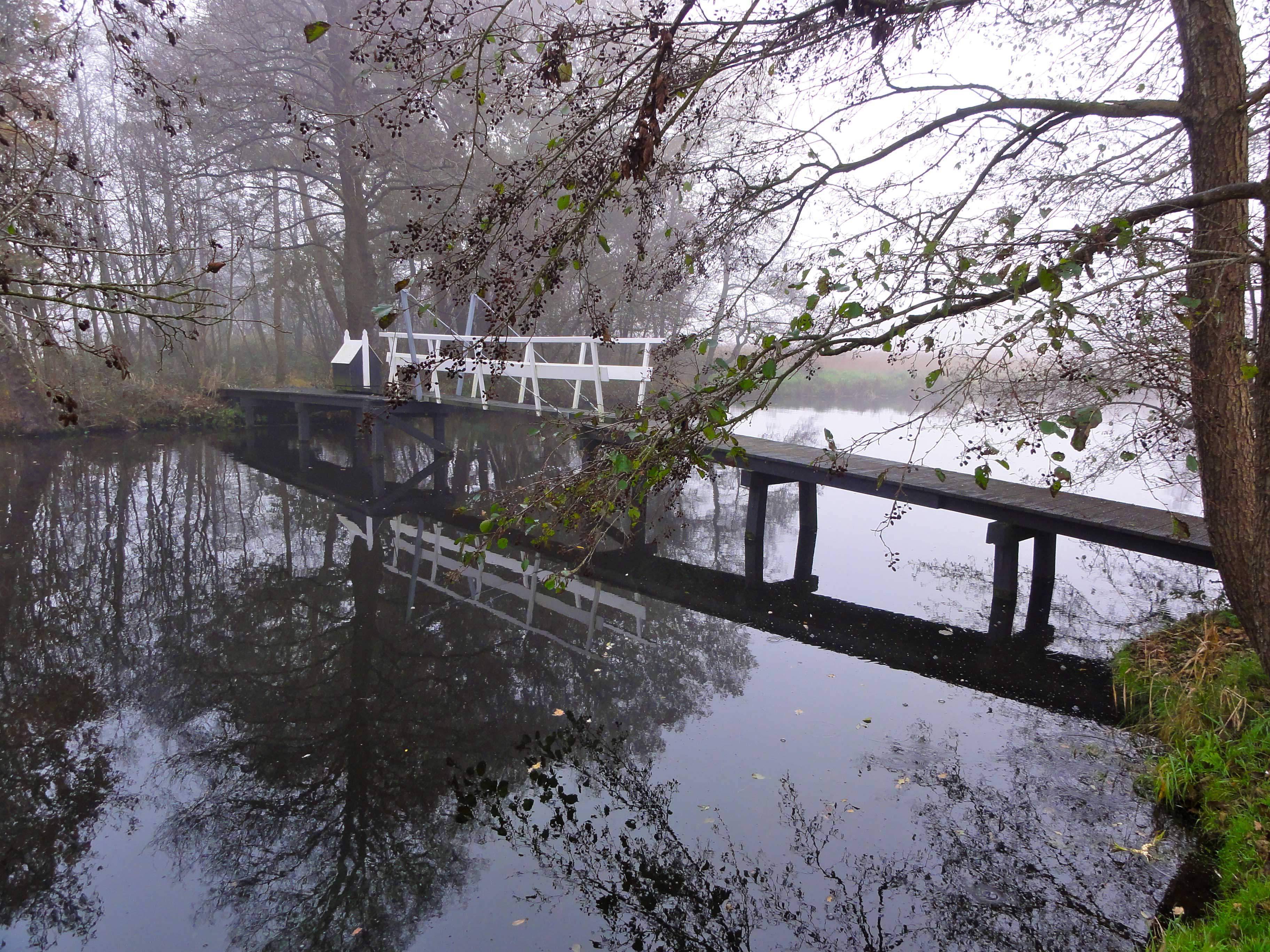 Draaibrug over de Scheene